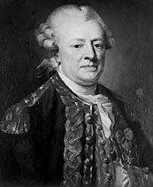 Portrait de Sébastien-François Bigot de Morogues (1706-1781). Artiste inconnu